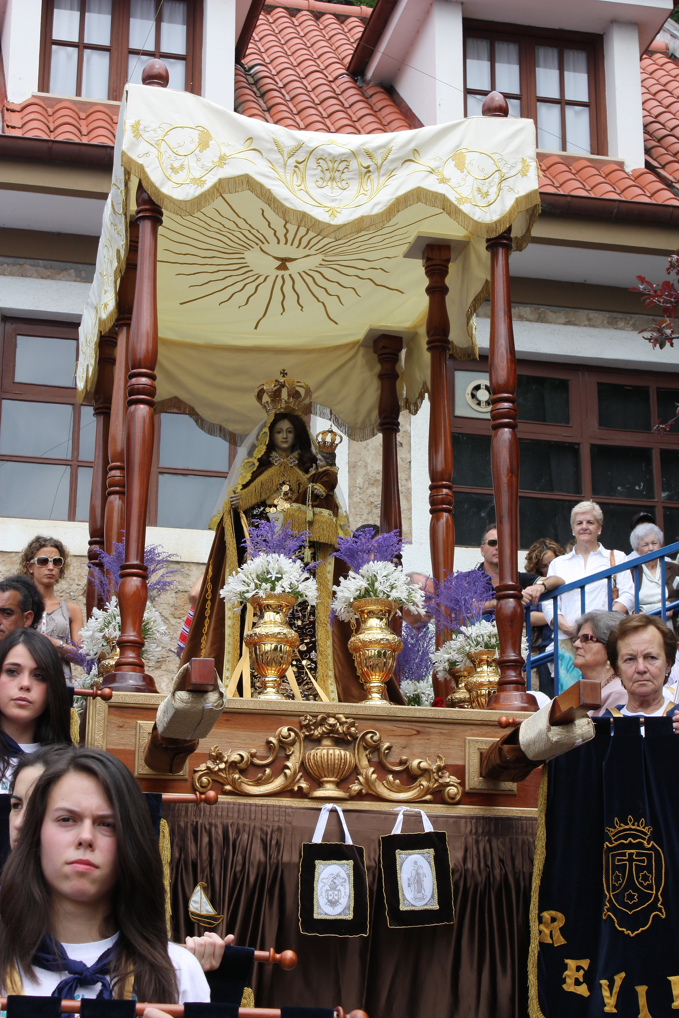 16/07/2011.- Tradicional procesión de la patrona del Valle de Camargo, la Virgen del Carmen, por la explanada de la ermita del Carmen, en el pueblo de Revilla, acompañada por los Picayos del Carmen, los piteros y los remeros de Camargo.